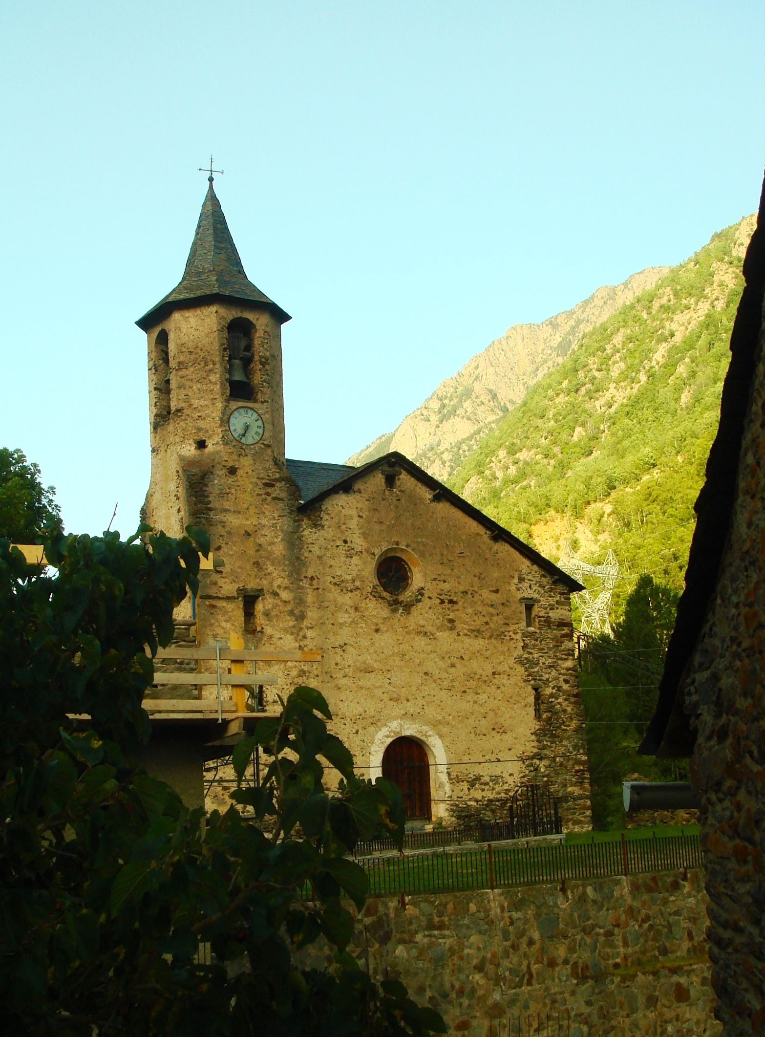 Església parroquial de Sant Bartomeu de Tavascan (Lladorre)